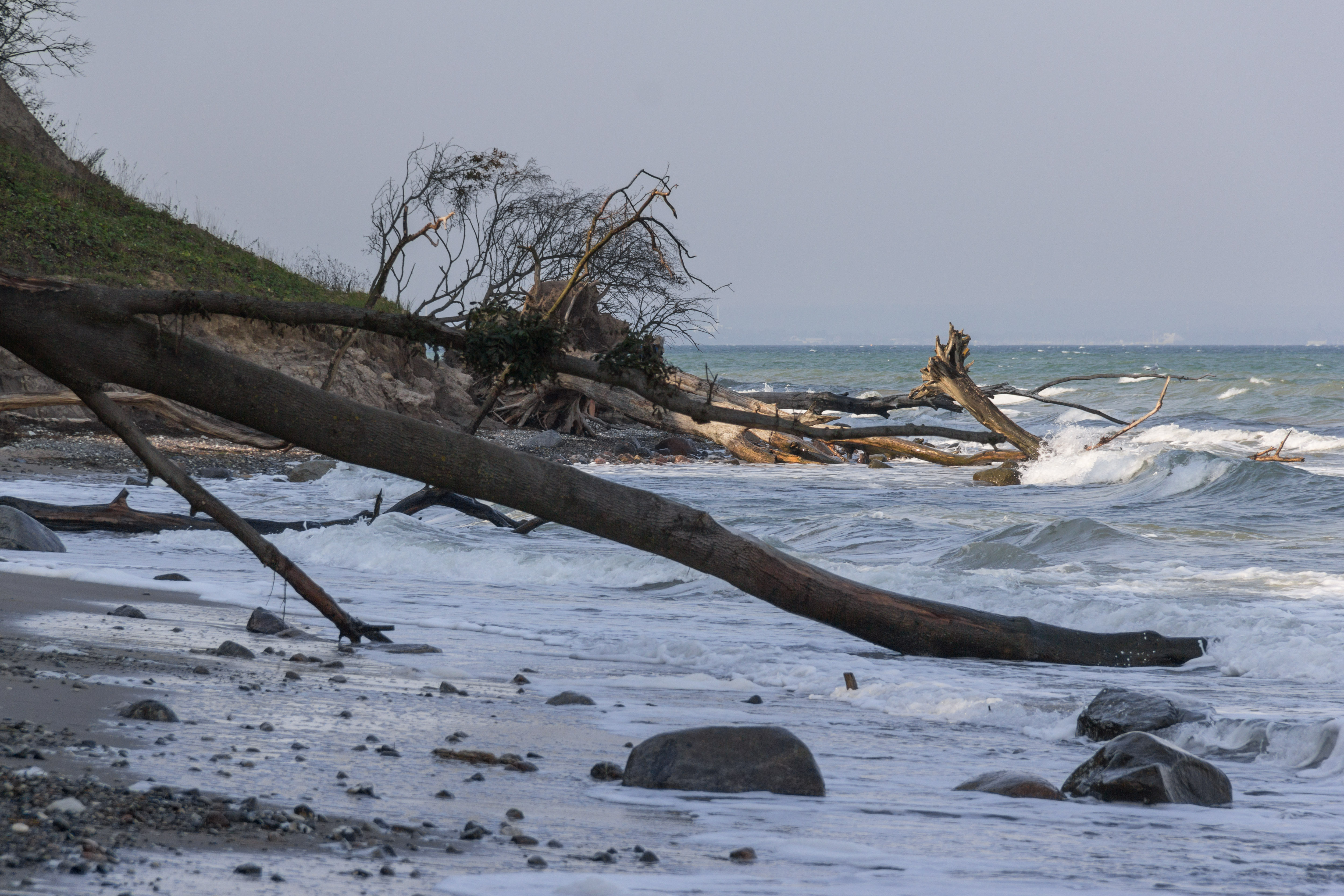 Brodtener Ufer, Landschaftsschutzgebiet, FFH-Gebiet, Vogelschutzgbeiet